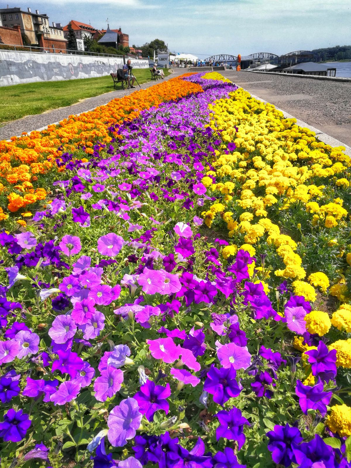 Bulwar Filadelfijski w Toruniu, lato